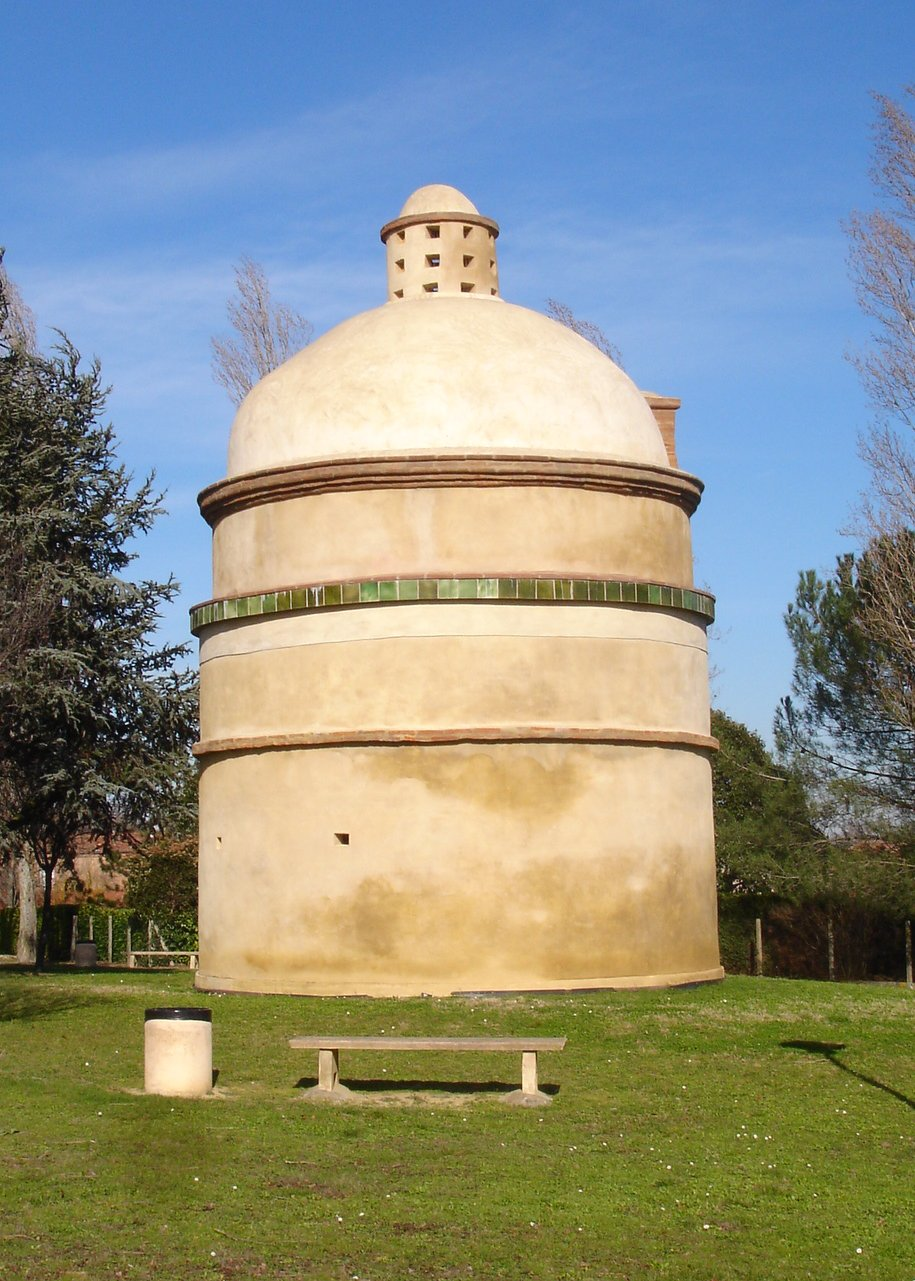 Pigeonnier de la comtesse à Ramonville-Saint-Agne (31)